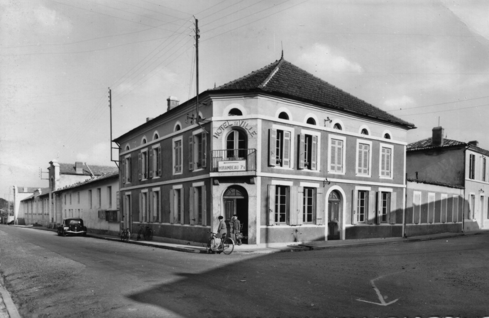 St bonnet sur gironde